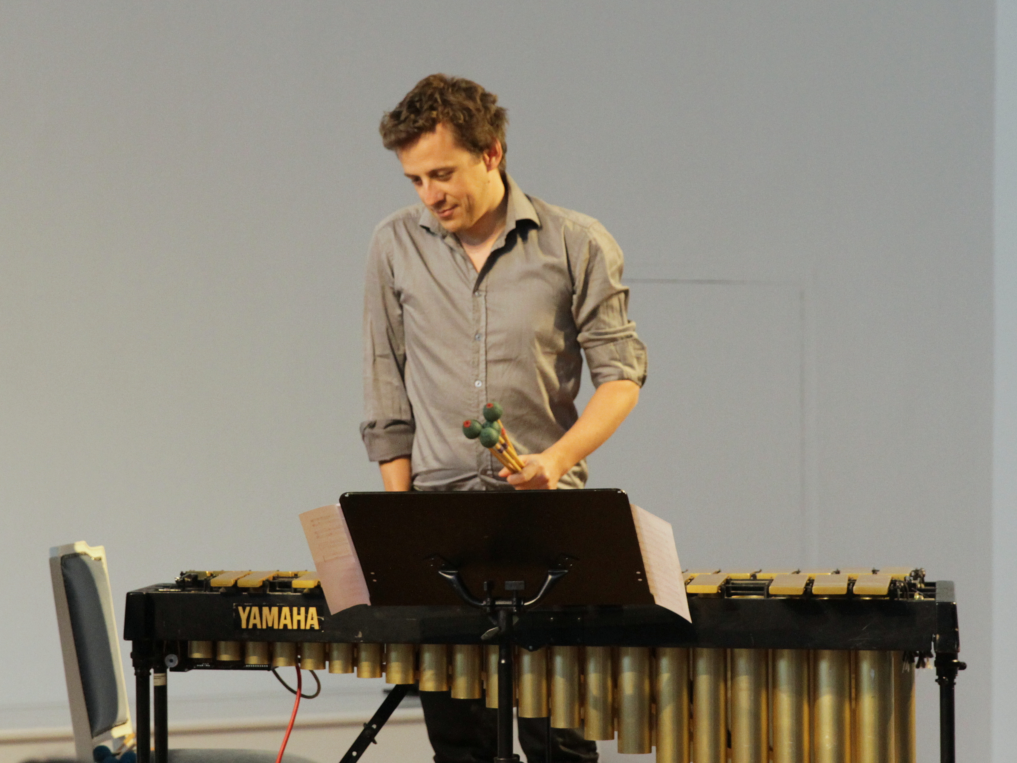 Tonspuren 2014 - Pascal Schumacher am Vibraphon Festivalsommer This photo was created with the support of donations to Wikimedia Deutschland in the context of the CPB project "Festival Summer". This file is made available under the Creative Commons CC0 1.0 Universal Public Domain Dedication. The person who associated a work with this deed has dedicated the work to the public domain by waiving all of their rights to the work worldwide under copyright law, including all related and neighboring rights, to the extent allowed by law. You can copy, modify, distribute and perform the work, even for commercial purposes, all without asking permission. Thomas Springer Personality rights warningAlthough this work is freely licensed or in the public domain, the person(s) shown may have rights that legally restrict certain re-uses unless those depicted consent to such uses. In these cases, a model release or other evidence of consent could protect you from infringement claims.